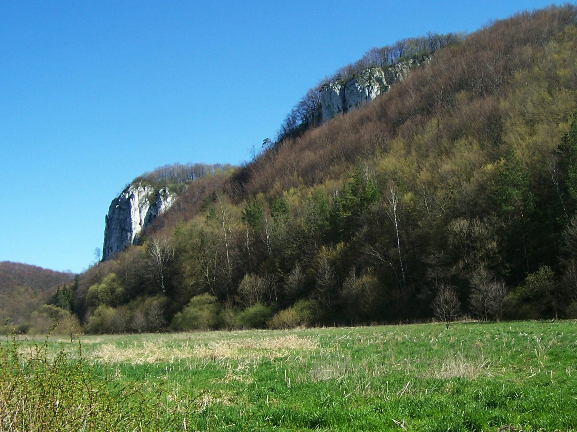 Dolina Będkowska (Park Krajobrazowy Dolinki Krakowskie)